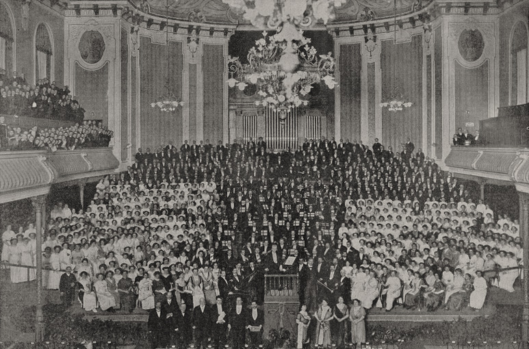 Aufführung der VIII. Sinfonie von Mahler unter Leitung von Professor Karl Panzer durch den Städtischen Musikverein Düsseldorf und die Konzert-Gesellschaft Elberfeld im Kaisersaal der Städtischen Tonhalle in Düsseldorf am 11. und 12. Dezember 1912. Foto Josef Henne, Düsseldorf